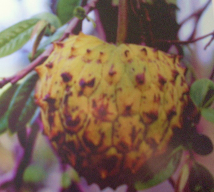 Rollinier appelé aussi gro'zat'